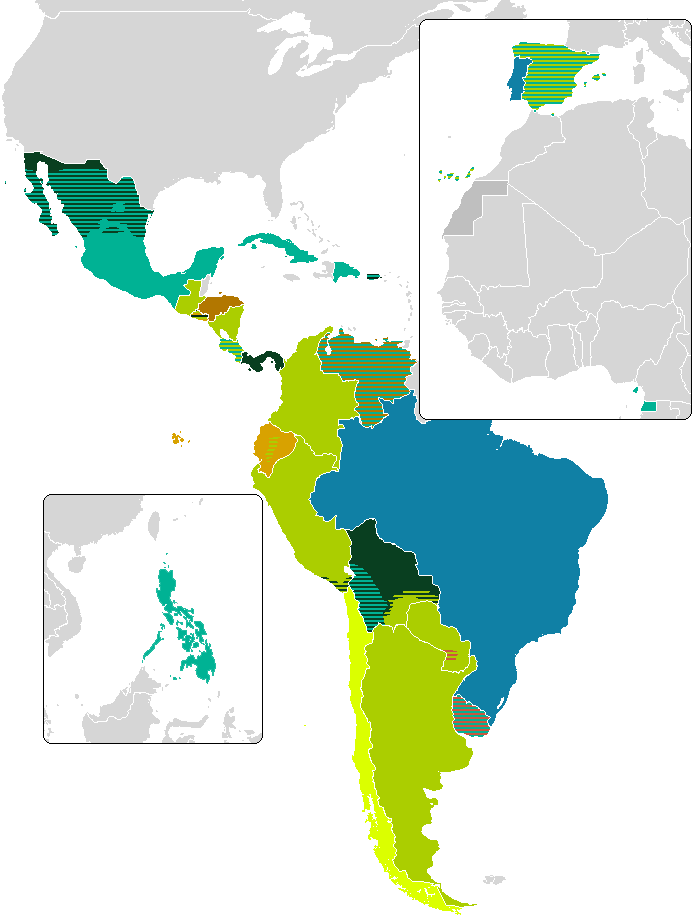 Mapa de nombres de las bebidas carbonatadas a lo largo de los paísos hispanohablantes.